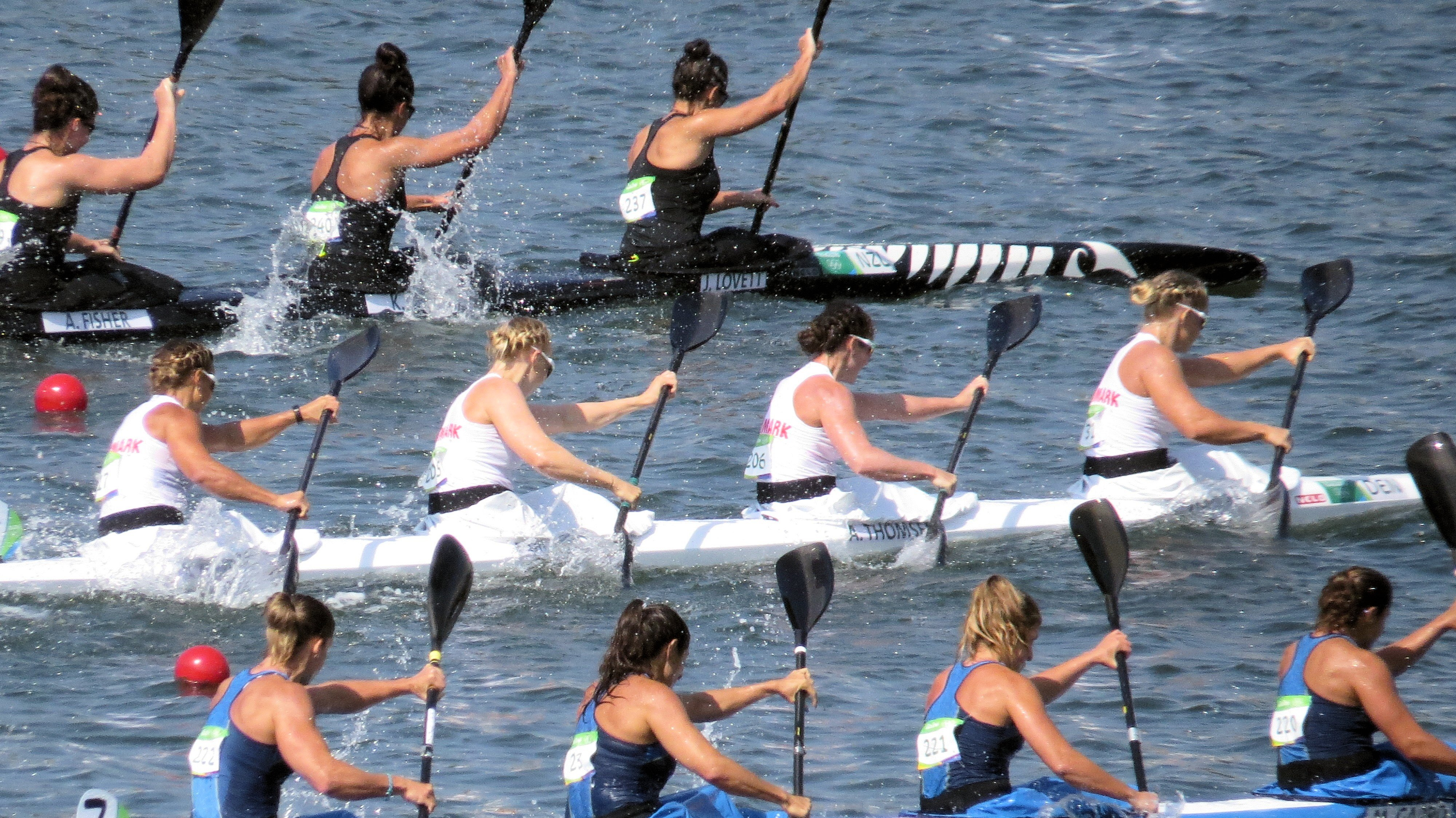 Sx50